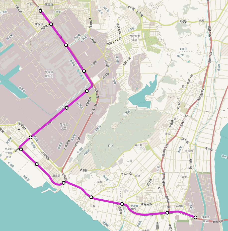 2017年高雄捷運輕軌小港林園線的替選方案